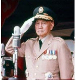 1966年10月10日，中華民國國慶閱兵，總統蔣中正向閱兵隊伍行舉手禮。